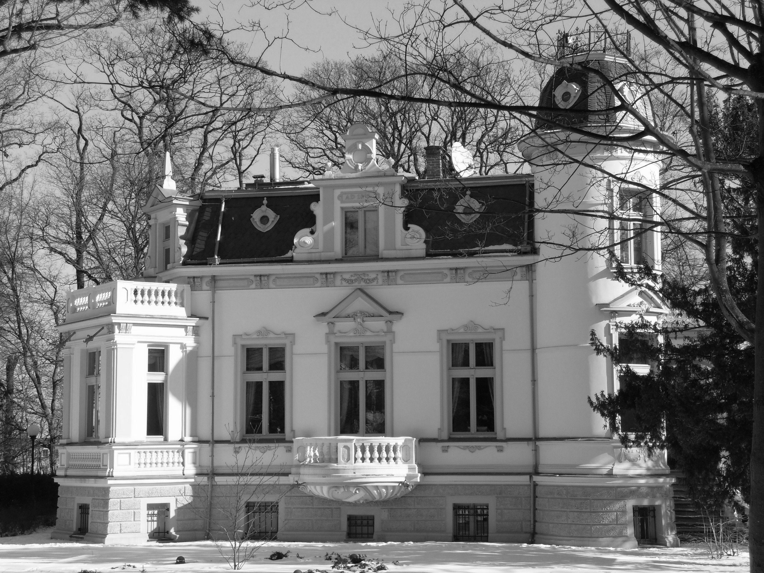 Sopot Dolny, ul. Władysława IV 3/5 - willa "Hestia", 1893 ("zagrała" dom konsula w filmie "DO WIDZENIA, DO JUTRA..." z 1960)